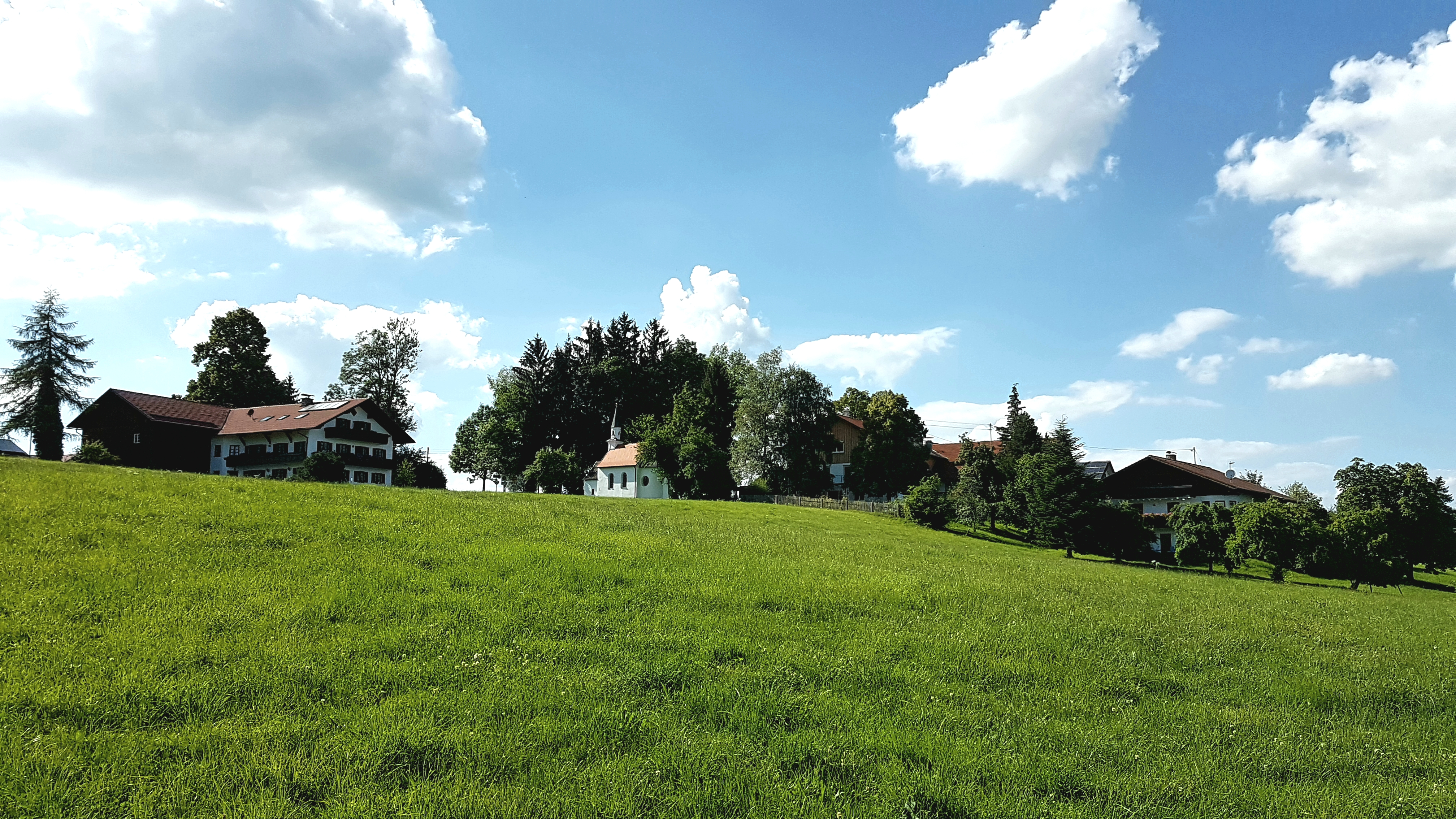 Günther (Bernbeuren), Ortsansicht von Südosten (160 m Entfernung).